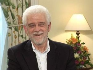 Escritor brasileiro Flávio Gikovate em imagem do acervo da TV Brasil.